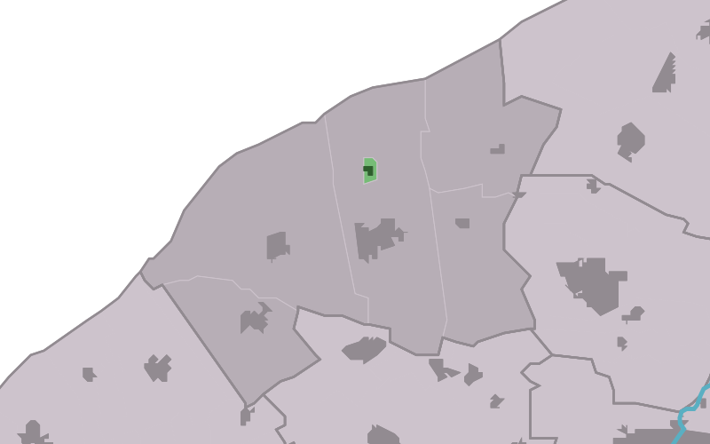 Kaartsje fan himrik fan Nij_Altena